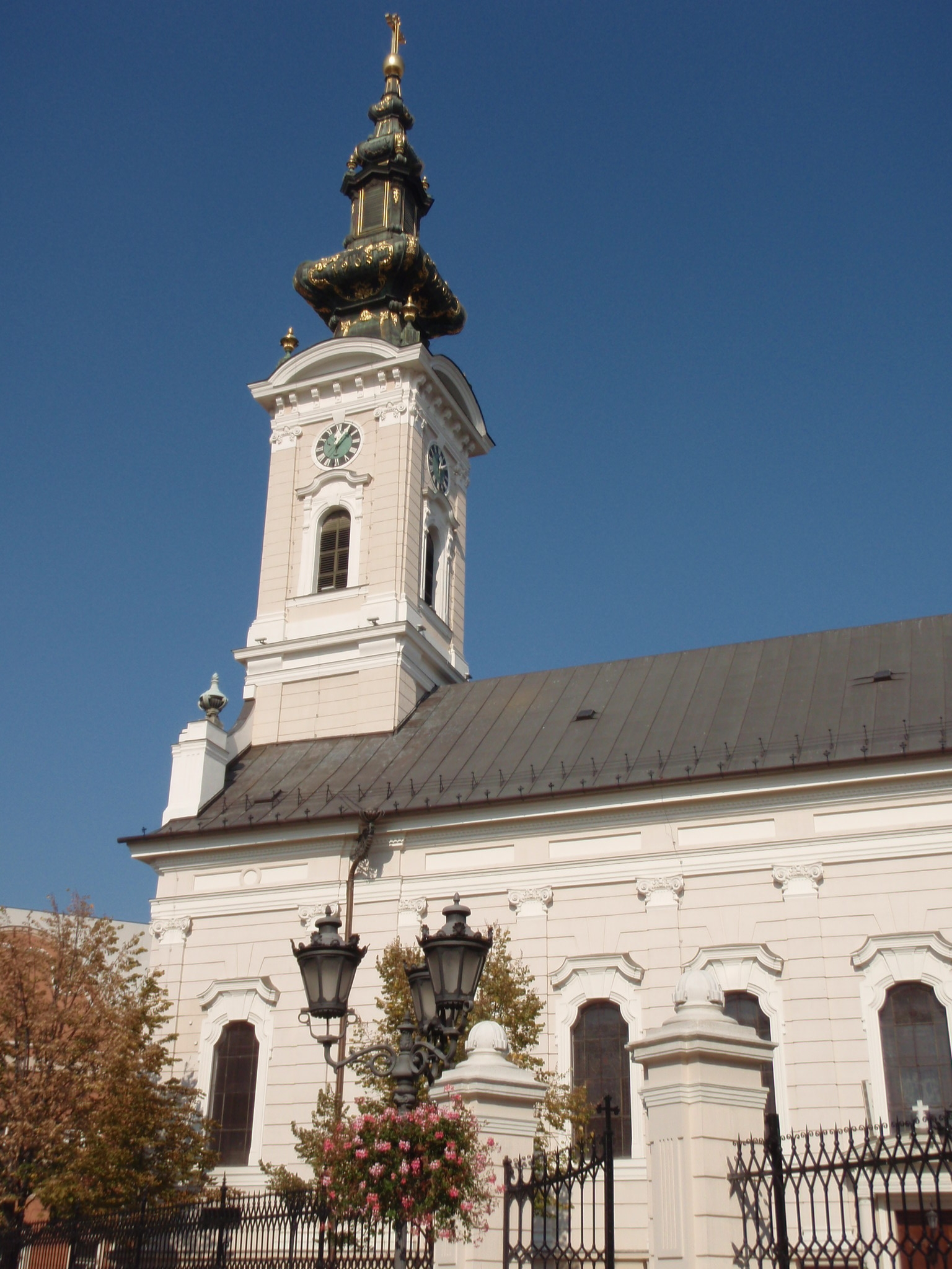 Saborna crkva Svetog Georgija